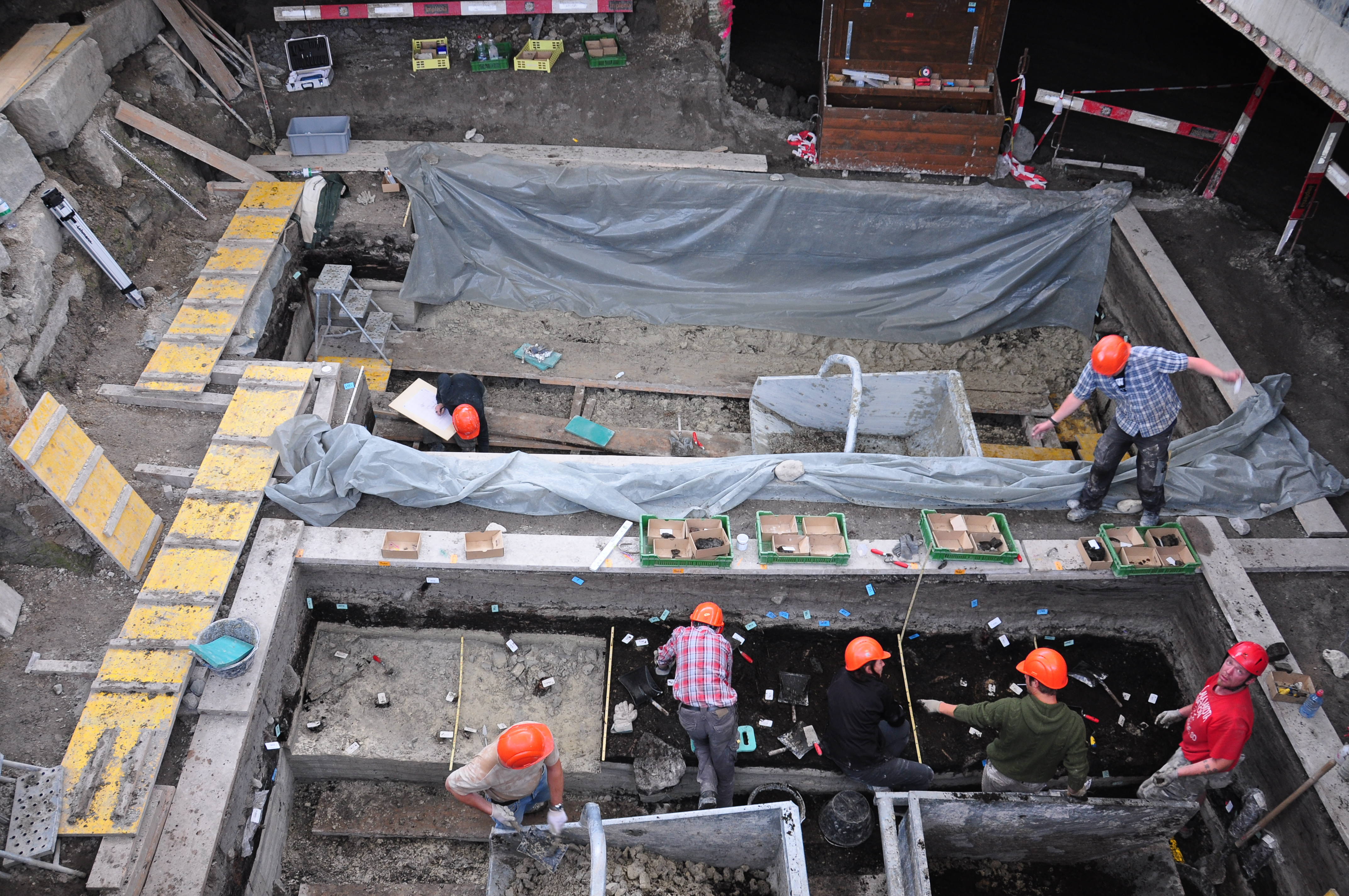 Archäologische Grabung Parkhaus Opéra in Zürich (Switzerland)